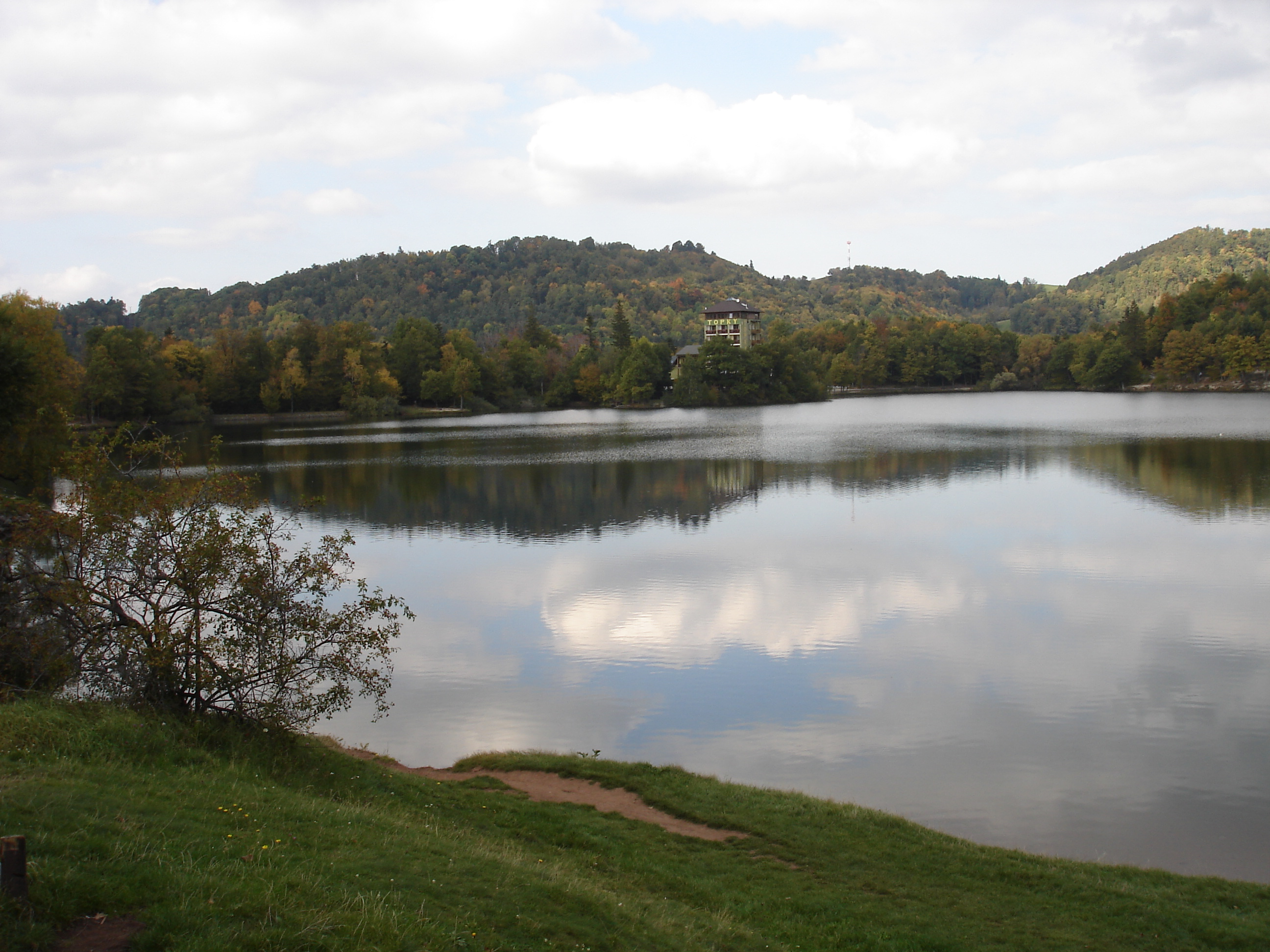 Počúvadské jazero